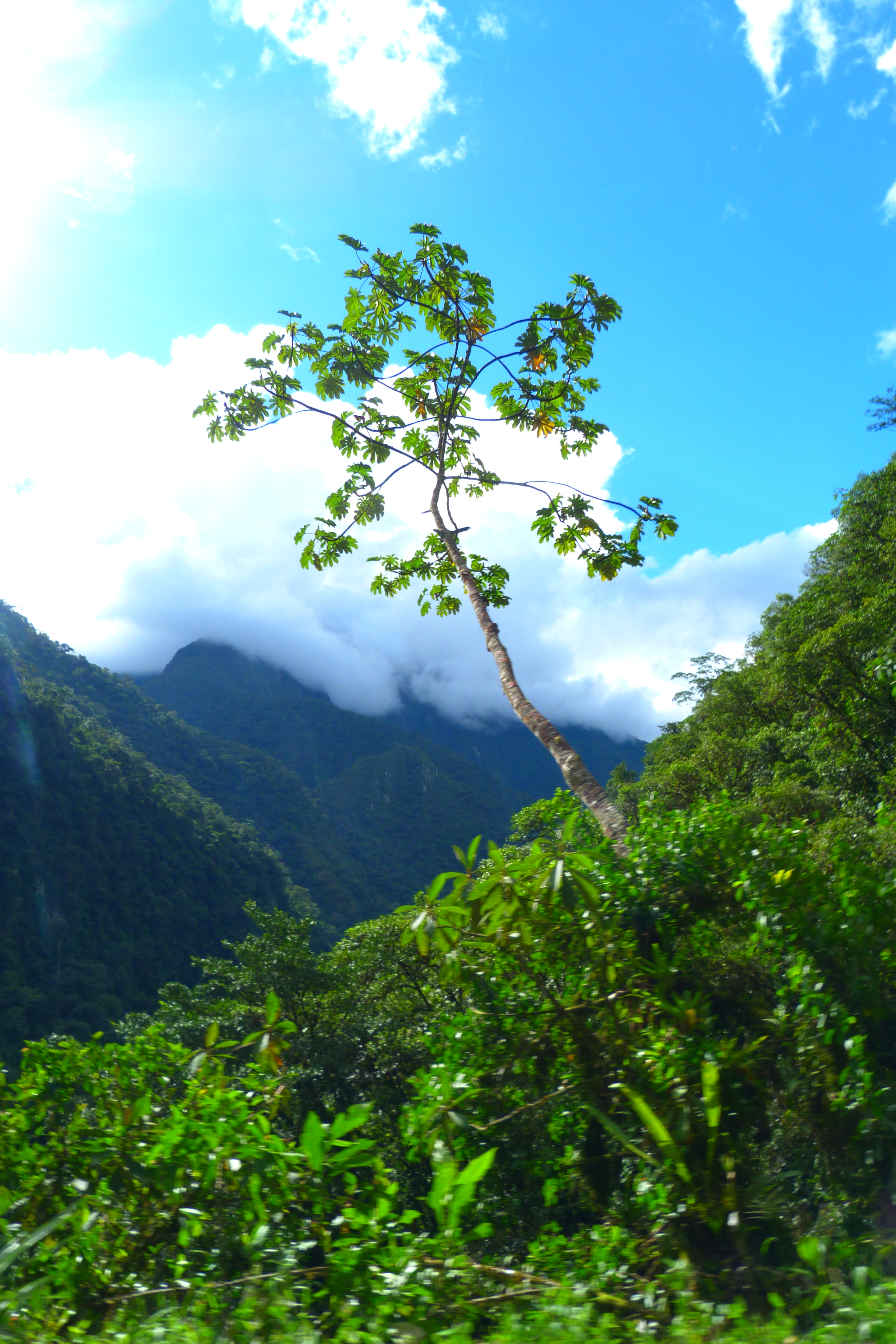 Vista del PN Yanachaga Chemillen